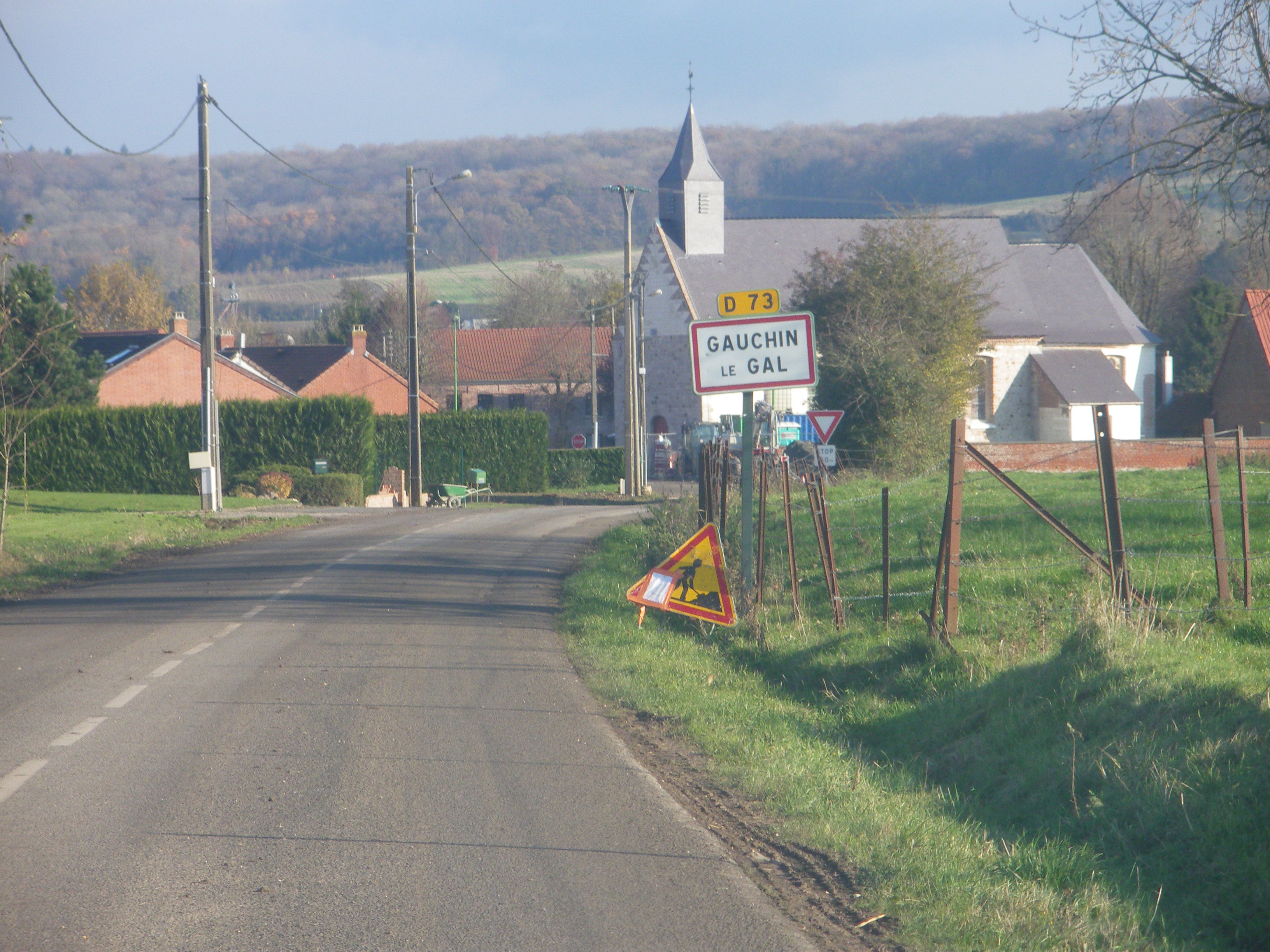 Entrée de la commune de Gauchin-Légal, l'église en second plan.